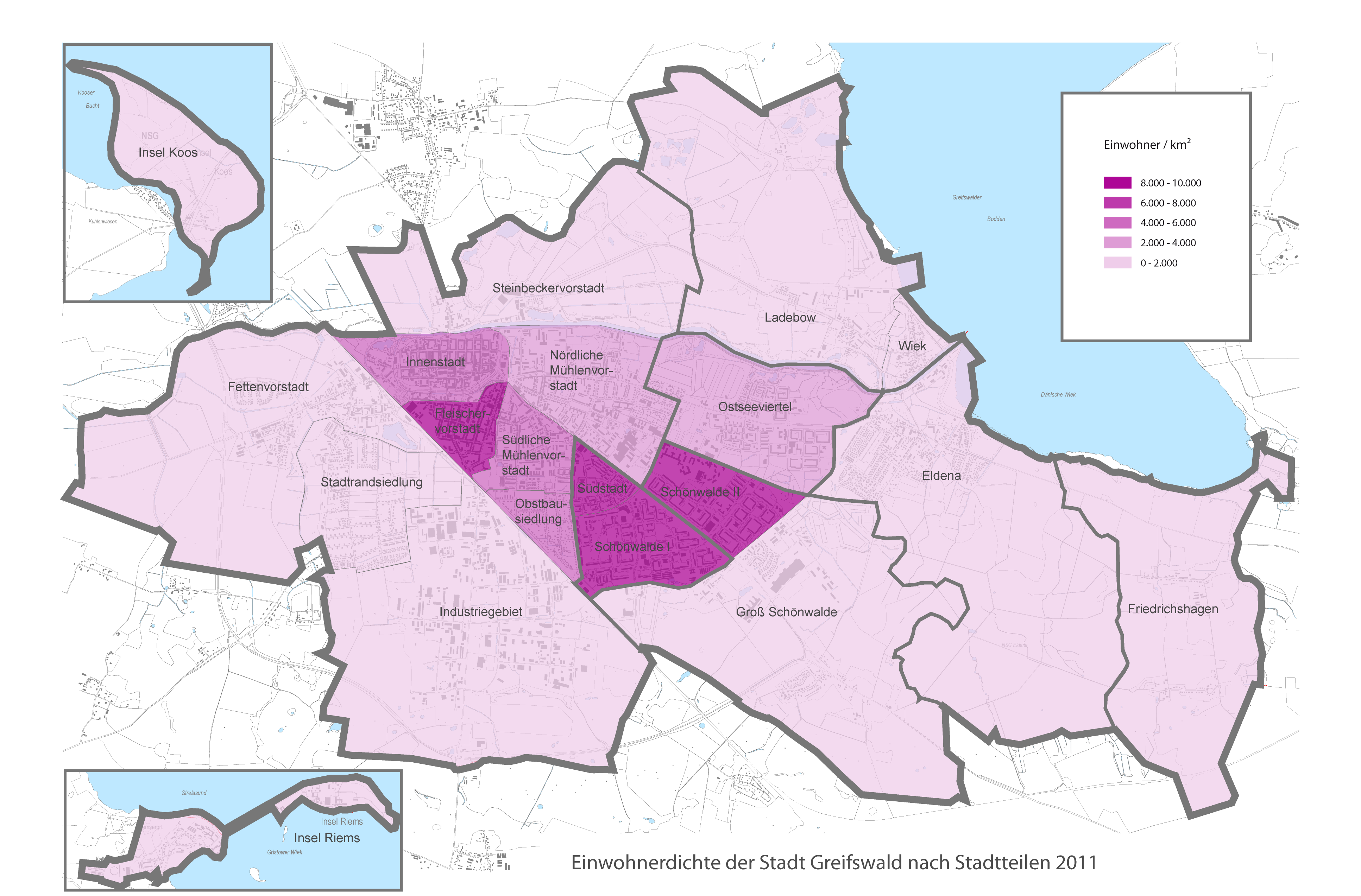 Einwohnerdichte nach Stadtteilen in Greifswald 2011